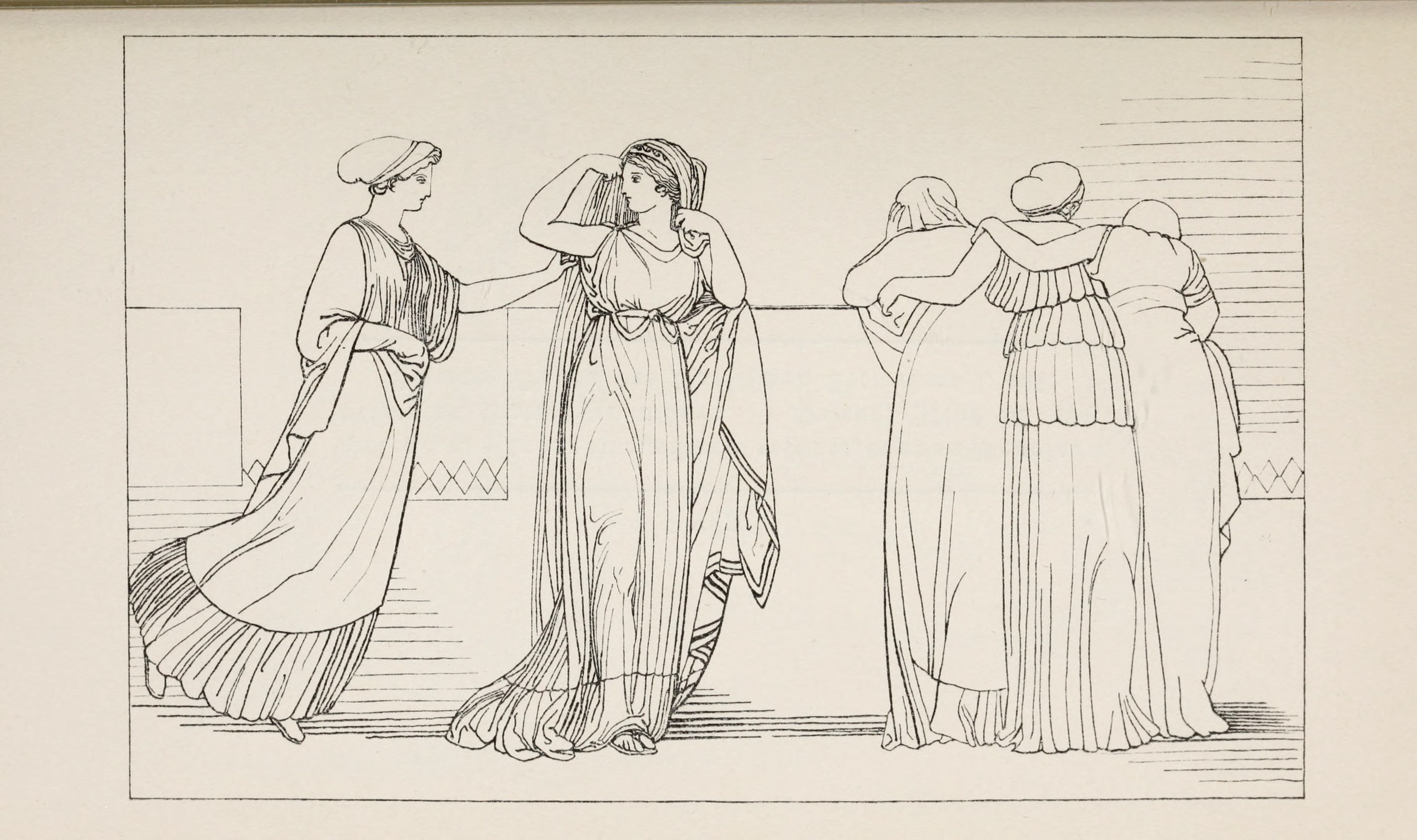 Aphrodite, Helena von der Mauer ins Gemach führend. – Homer, Ilias III. 385. Schwab, Sagen des klassischen Altertums I. 407.